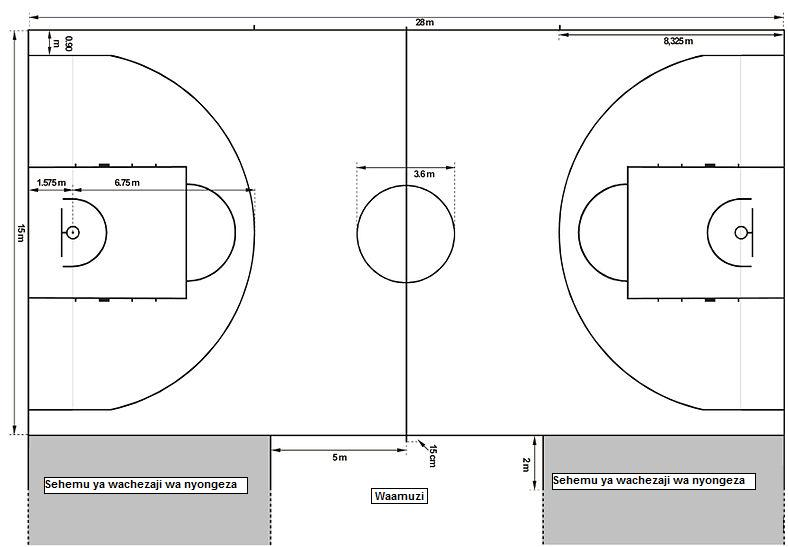 Kiswahili: imeswahilishwa kutokanana na File:Basketball_court_dimensions_2010.jpg